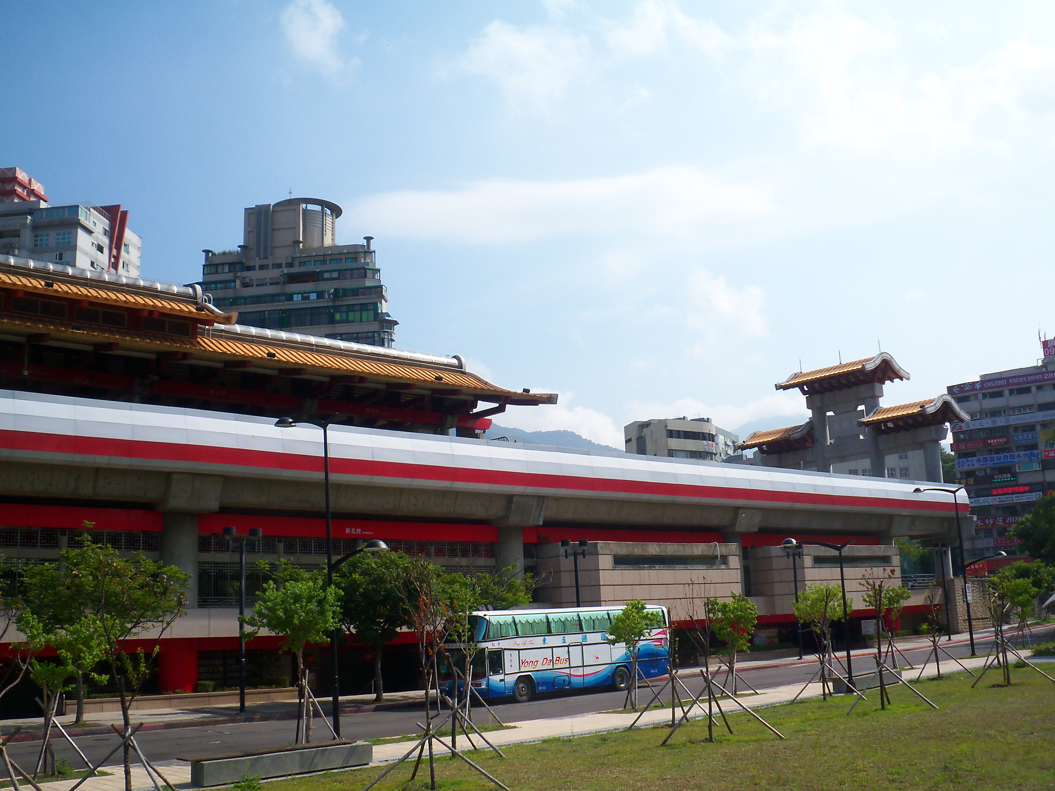 台北捷運新北投支線新北投駅東端、新北投支線の終点。